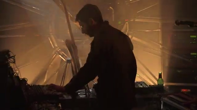 Romain Turzi sous le nom de Turzi le 21 janvier 2017 à Paris, à la Maroquinerie, lors d'une soirée Gonzaï.